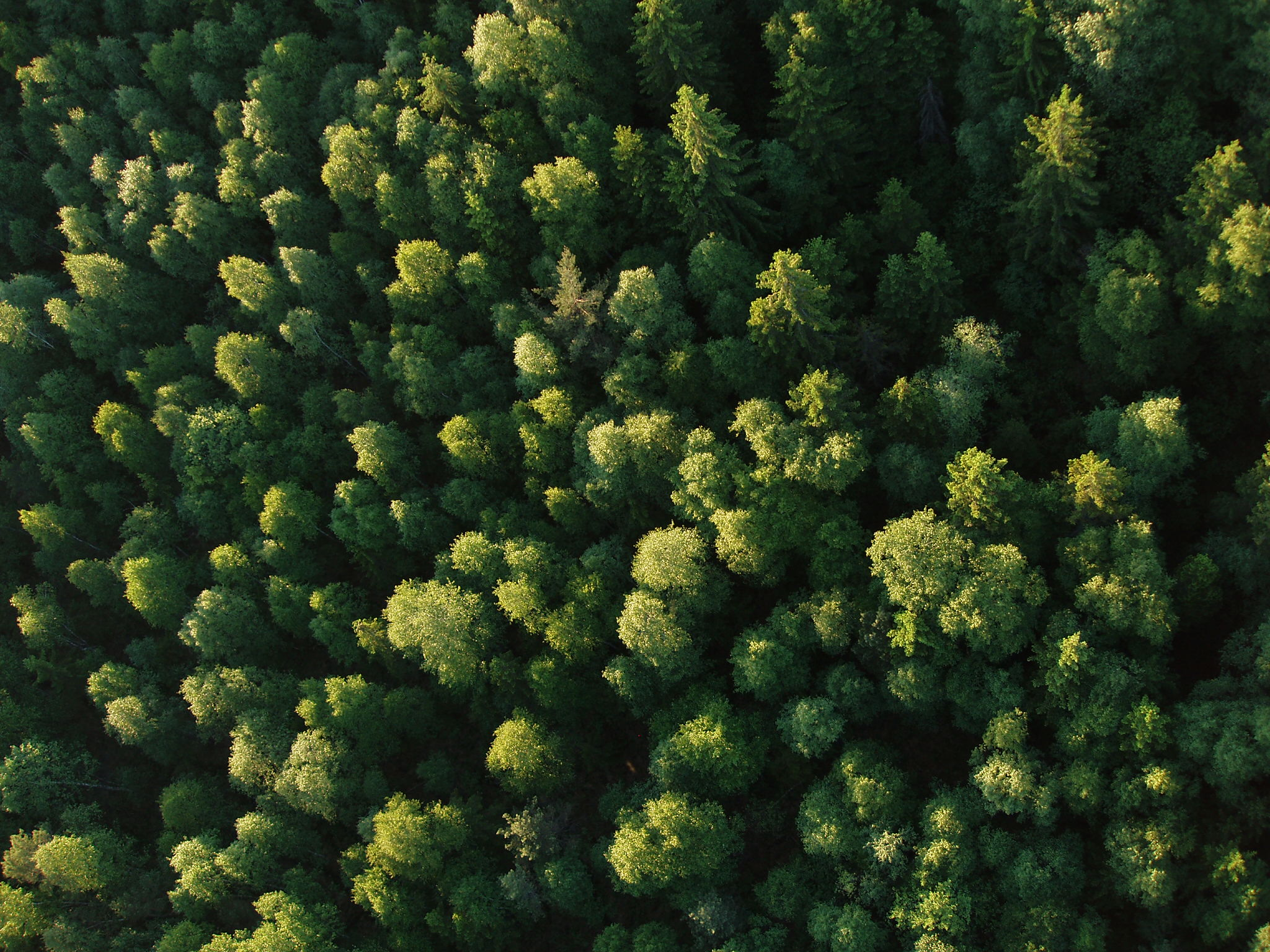 Mets pealtvaates.